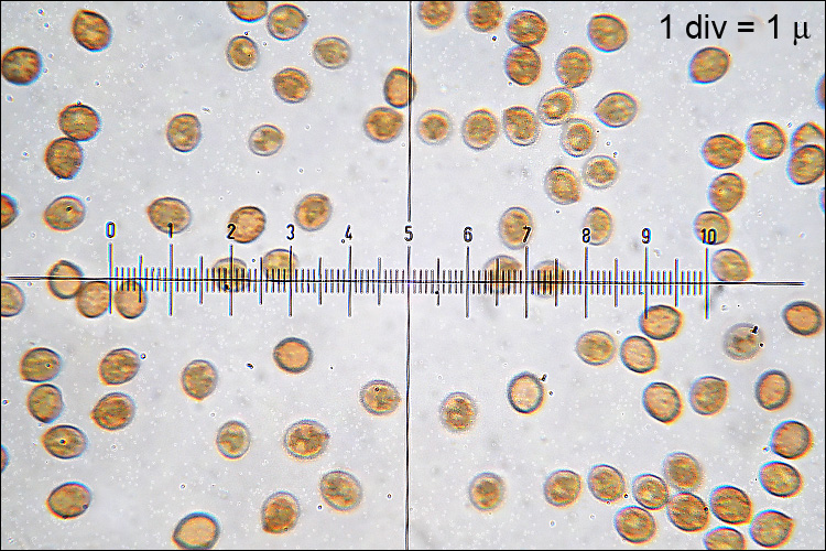 Cortinarius venetus var. montanus M.M. Moser 1970